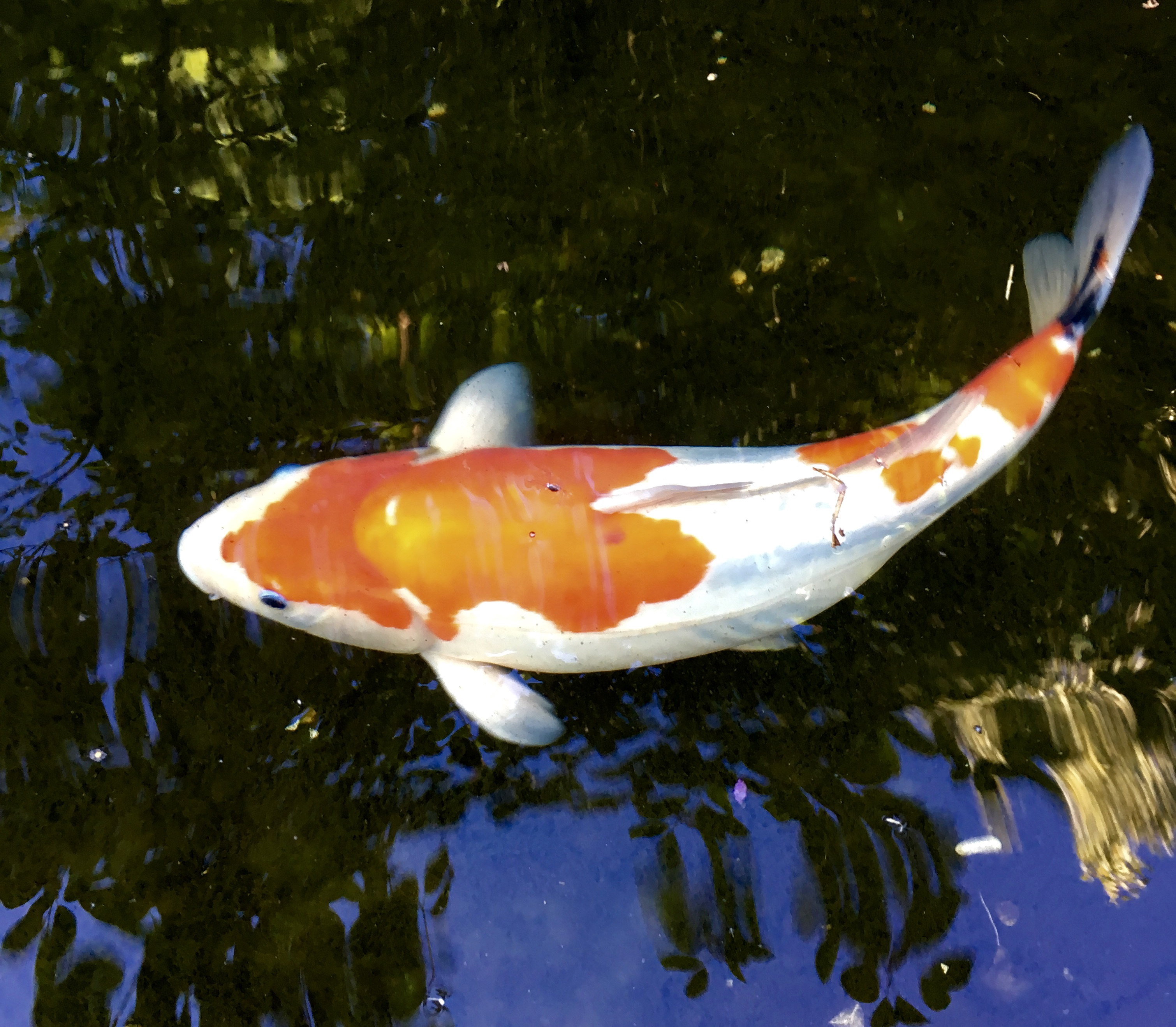 Magnifique Koï Kohaku vivant dans les bassins du musée vivant de la plante aquatique.